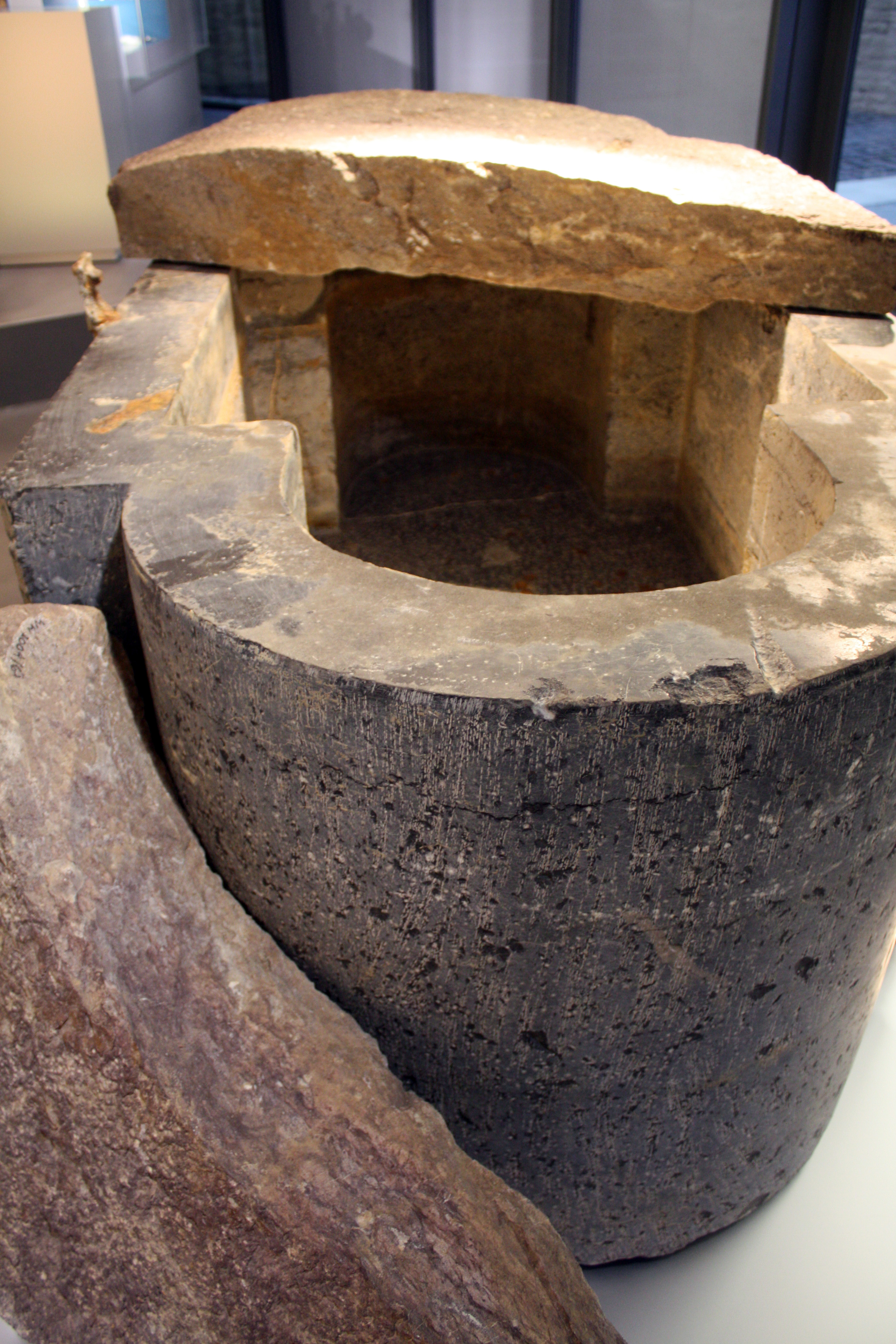 Museum der Badekultur, Zülpich. Ein aus Namur- Blaustein gefertigtes Bassin zu Badezwecken aus römischer Zeit (um 250). Freigelegt wurde es anlässlich von Grabungen auf einem Friedhofsgelände (200/04) des Ortes Alt-Inden. Ursprünglich diente es der römischen Herrschaft eines Gutes als Wanne eines Bades. In späterer, fränkischer Zeit als Sarkophag genutzt, der die Asche und Grabbeigaben der Toten nach ihrer Feuerbestattung aufnahm